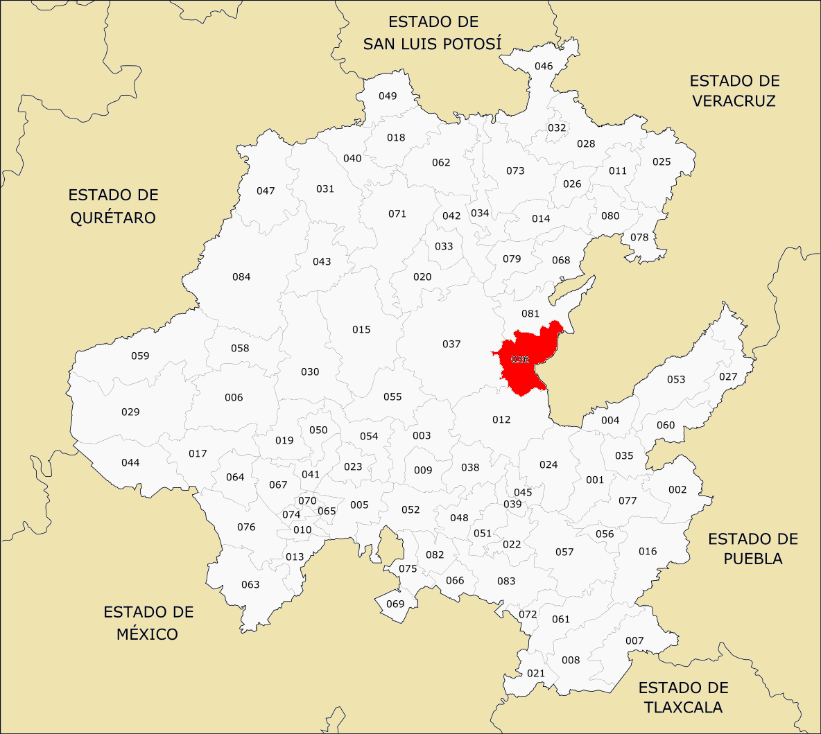 Municipios de Hidalgo